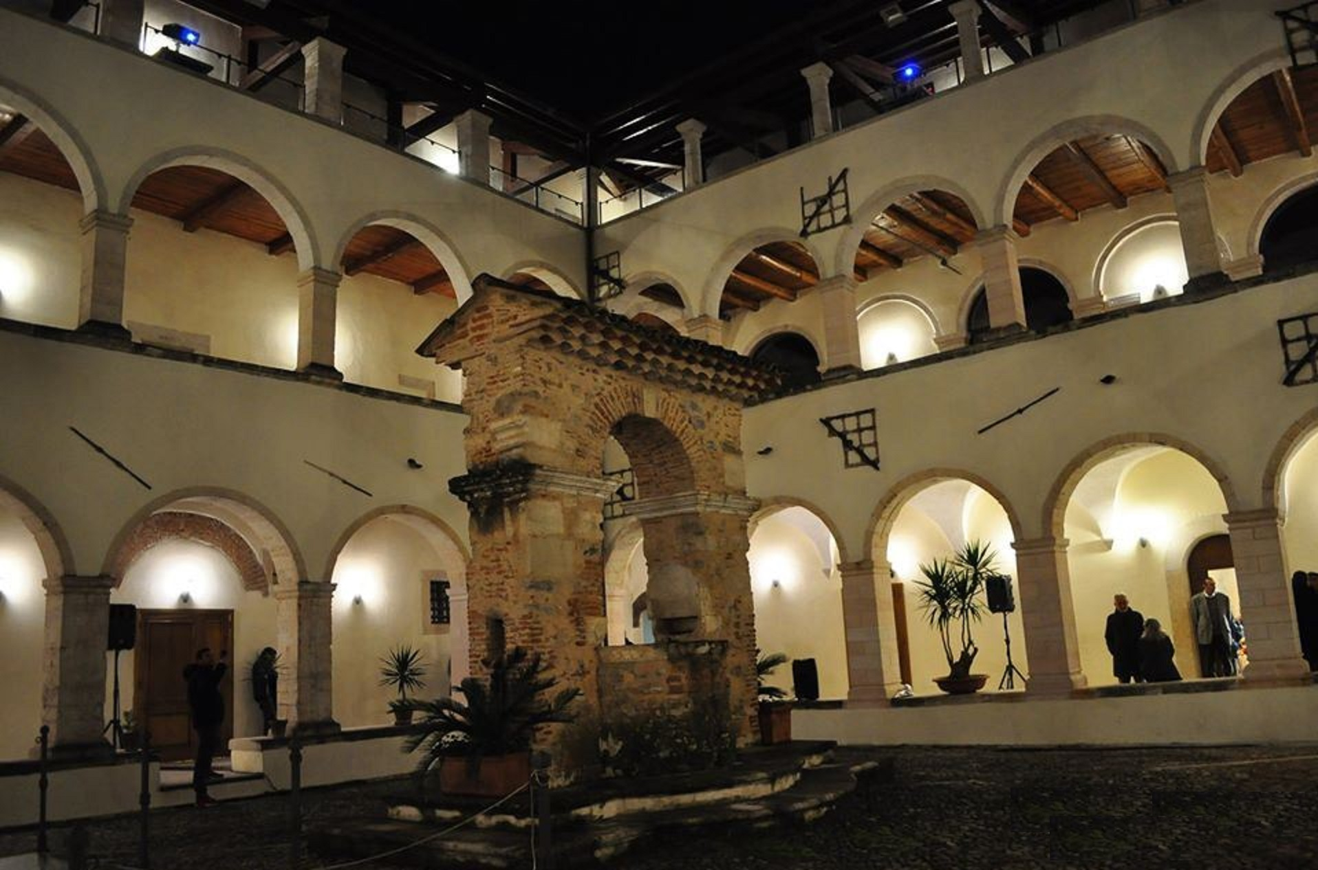 Complesso monumentale Sant'Agostino a Cosenza